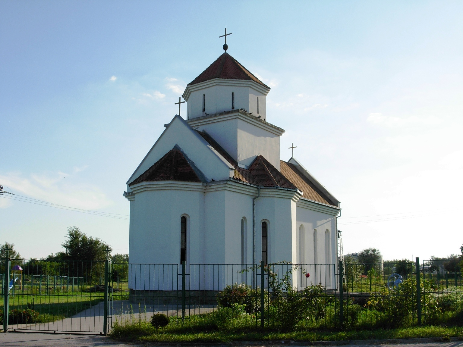 Pravoslavna crkva u naselju Šangaj, Novi Sad.